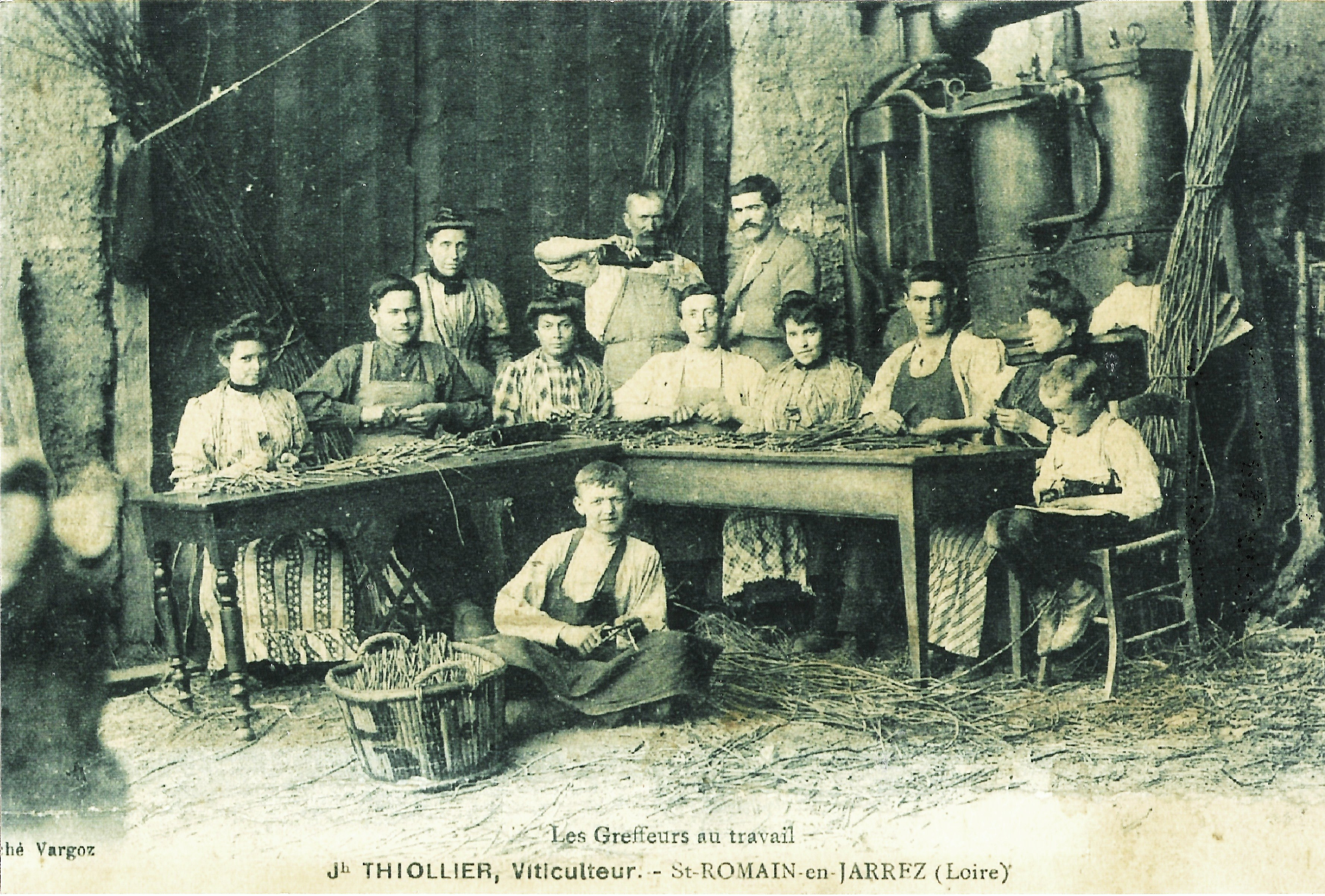 Les greffeurs au travail. - J.b. Thiollier, viticulteur. - St Romain en jarez (Loire)